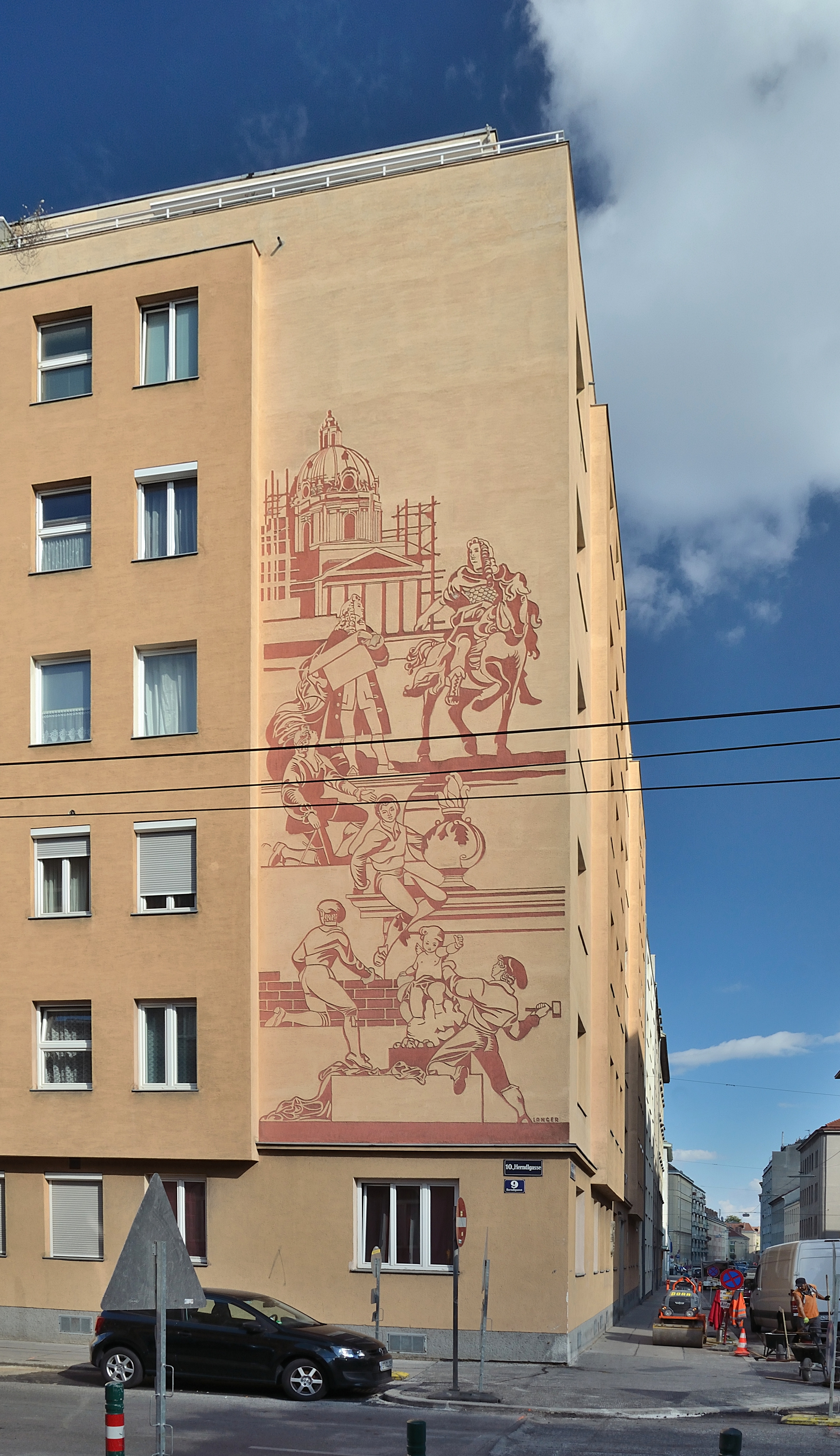 Das Sgraffito am Haus Herndlgasse 9 (Ecke Erlachgasse 88) zeigt die Erbauung der Karlskirche durch Johann Bernhard Fischer von Erlach. Es ist mit Langer signiert, vermutlich handelt es sich um den 1902 geborenen Karl Langer.